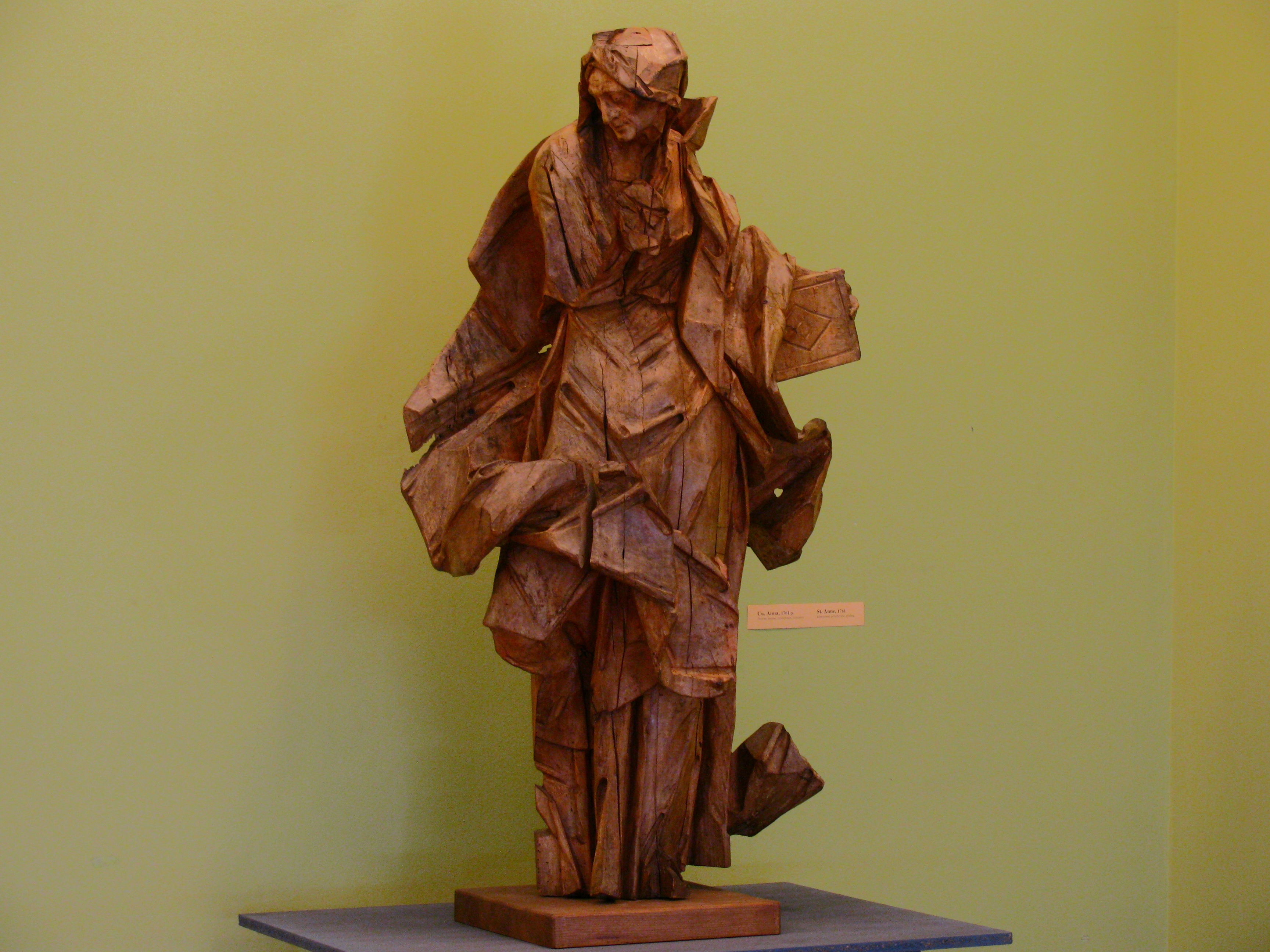 Іван Георгій Пінзель. Свята Анна, костел у м. Монастириська. 1761 рік. Липове дерево. Виставка "Майстер Пінзель - легенда і реальність" у Львівській національній галереї мистецтв імені Бориса Возницького